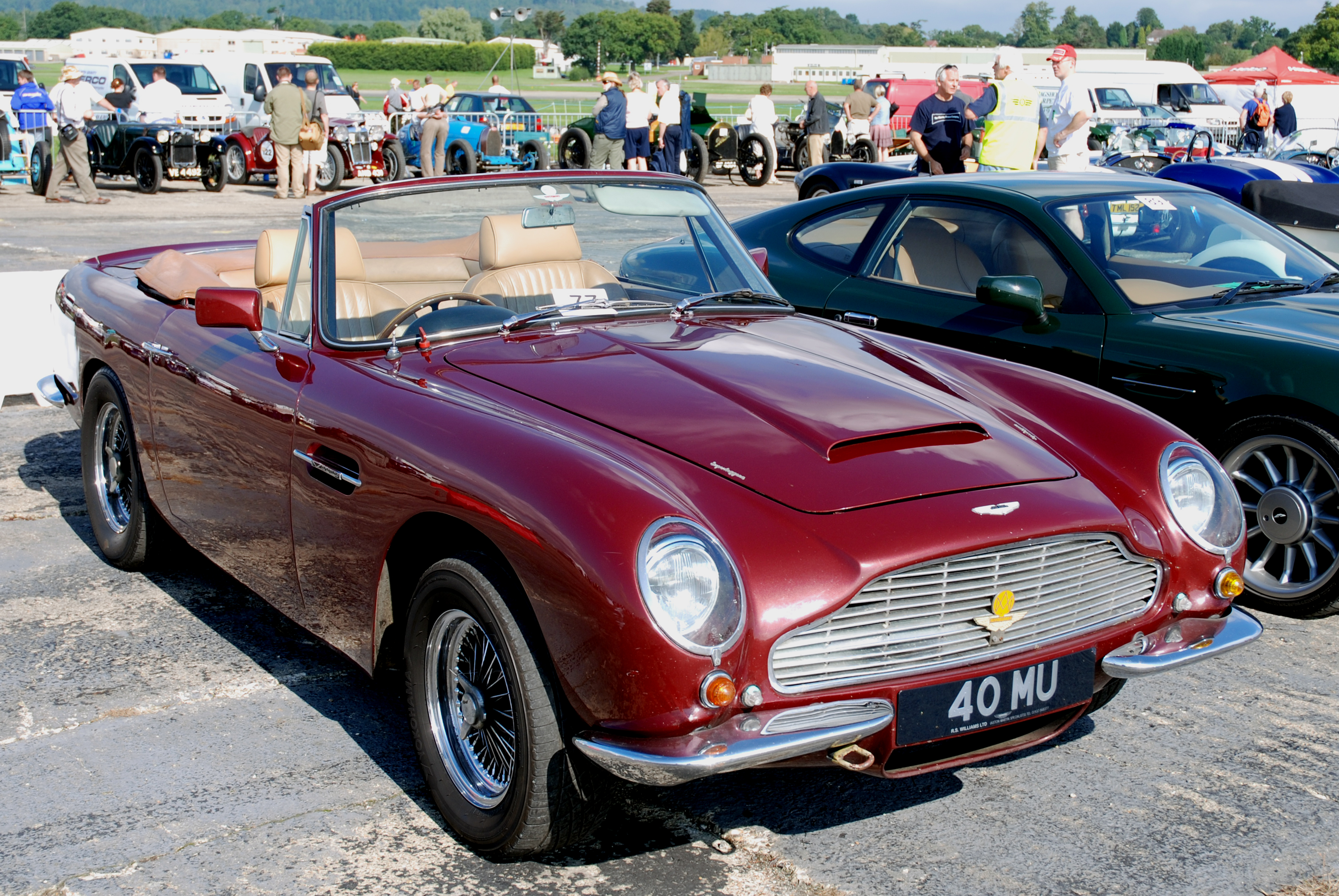 @ Dunsfold Wheels and Wings 2007